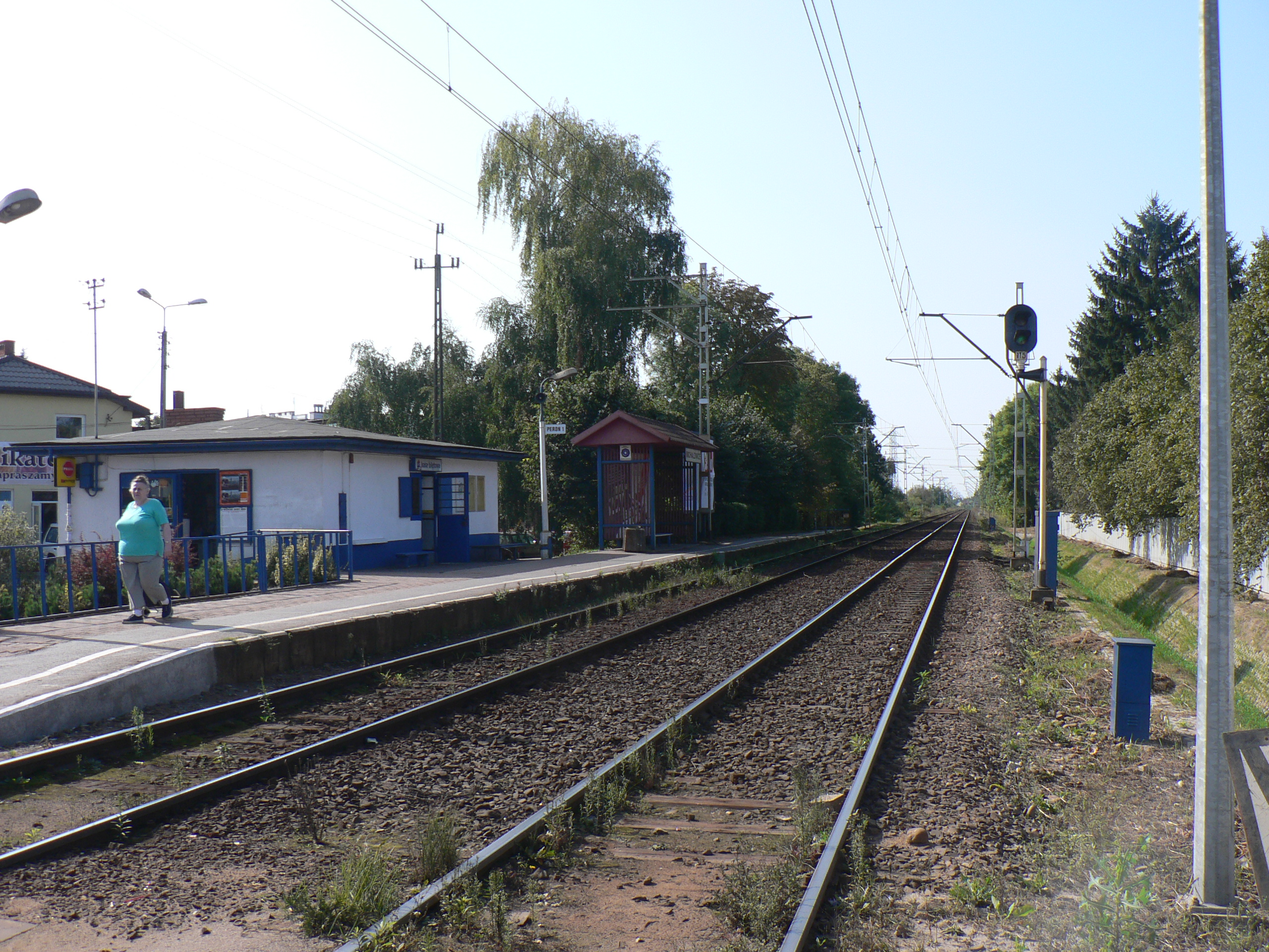 Stacja WKD w Michałowicach